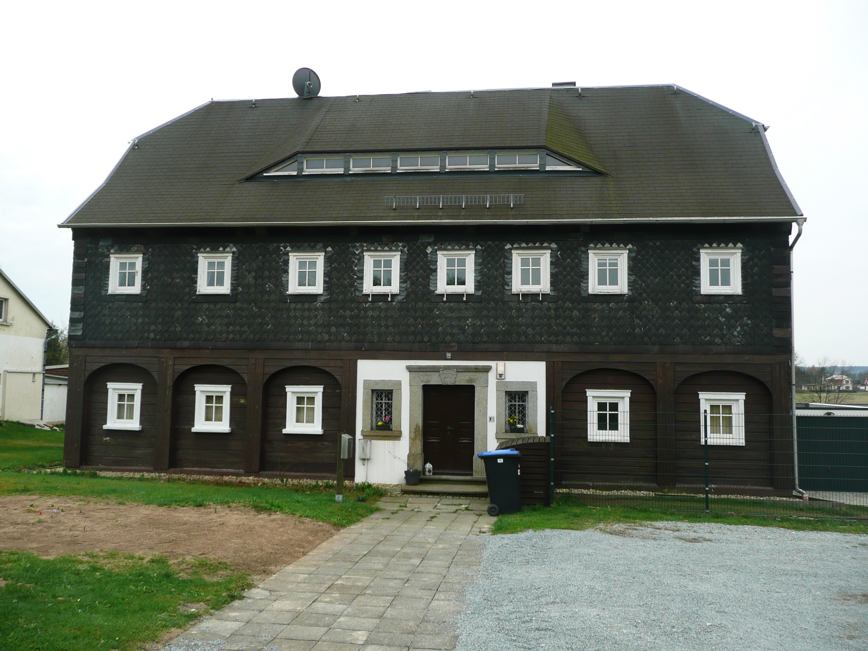 Umgebindehaus Ebersbach Spreedorfer Straße86